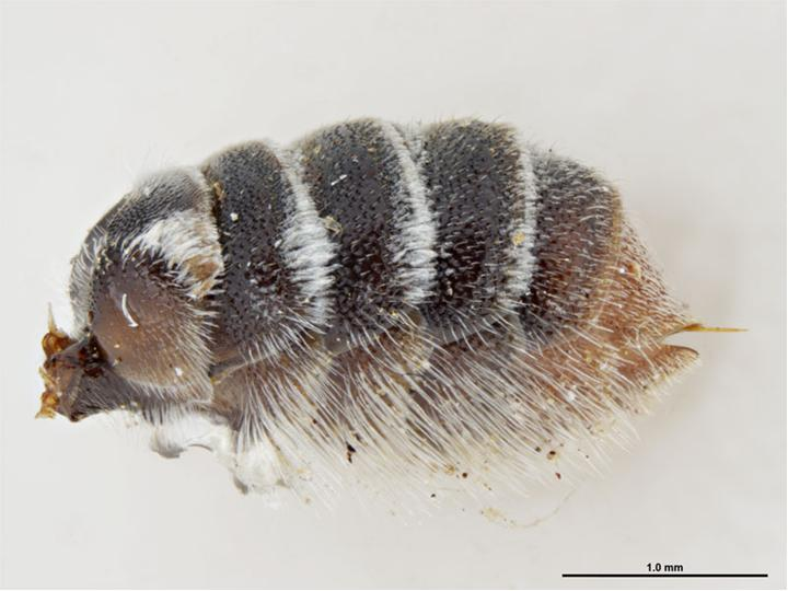 Megachile fultoni female abdomen